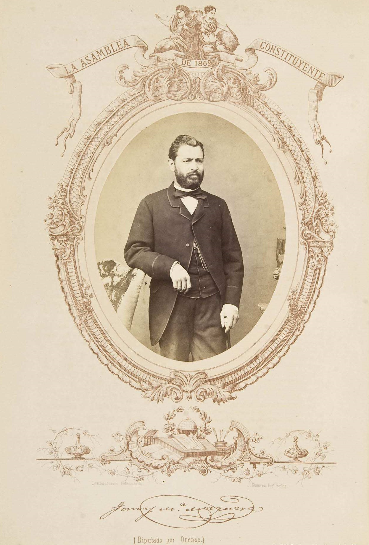 Retrato de Tomás María Mosquera. Fotografía de José Suárez sobre orla litográfica de Zaragozano. Inscripción: La Asamblea Constituyentes de 1968 / [facsímil de la firma] / (Diputado por Orense). Biblioteca Nacional de España